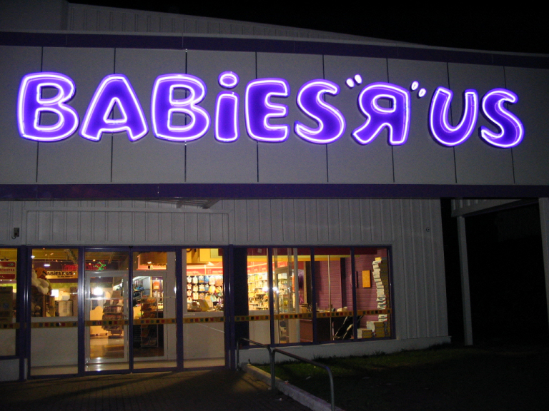 Façade du magasin Babies "R" Us d'Englos